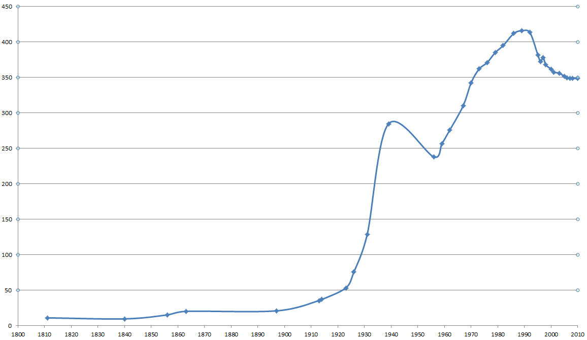 Динамика численности населения Архангельска с 1811 по 2010 годы, источник данных энциклопедия «Мой Город». Ось X - год, ось Y - население в тысячах человек